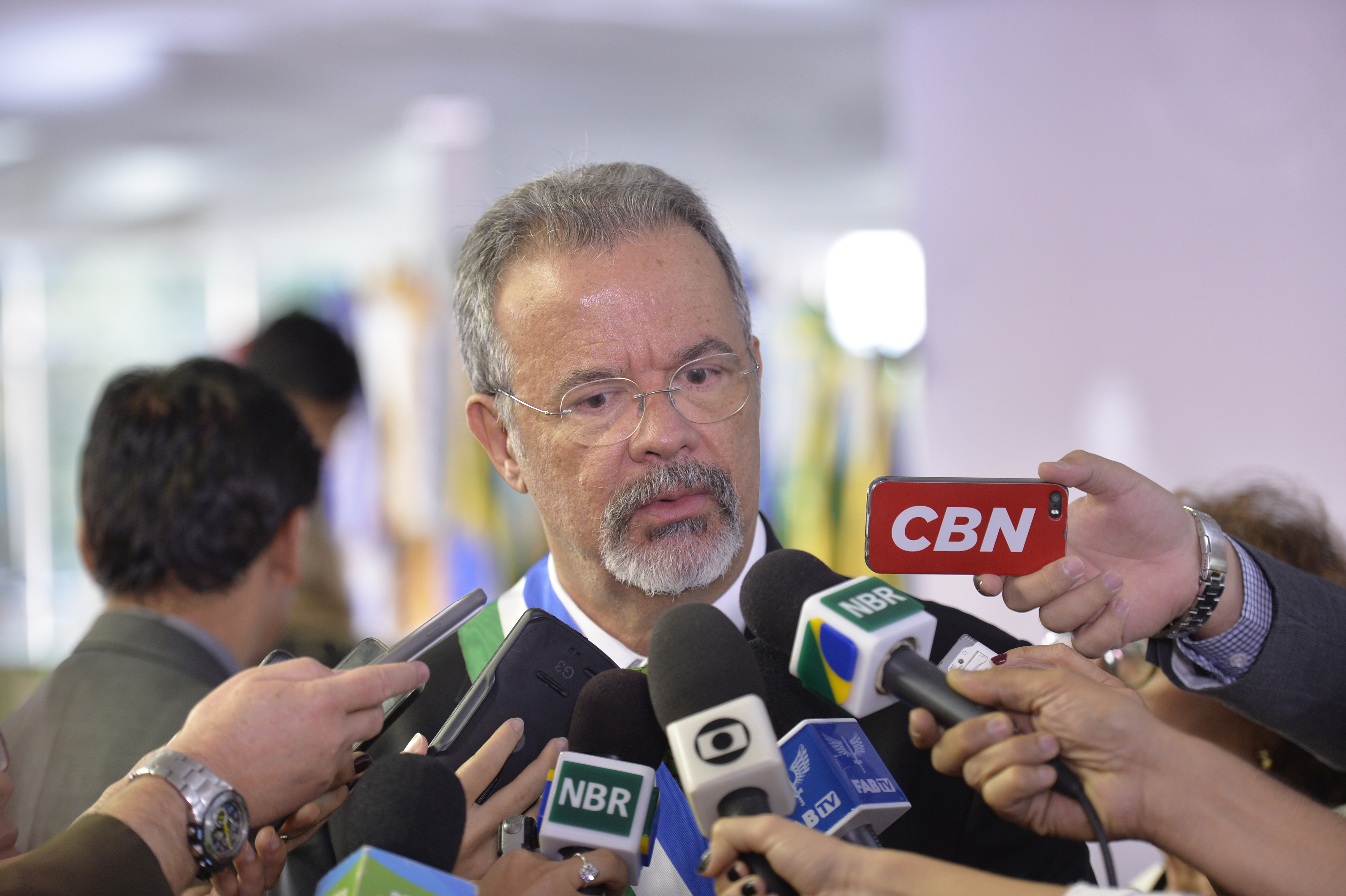 16/05/2016, Brasília - DF Fotos: Gilberto Alves